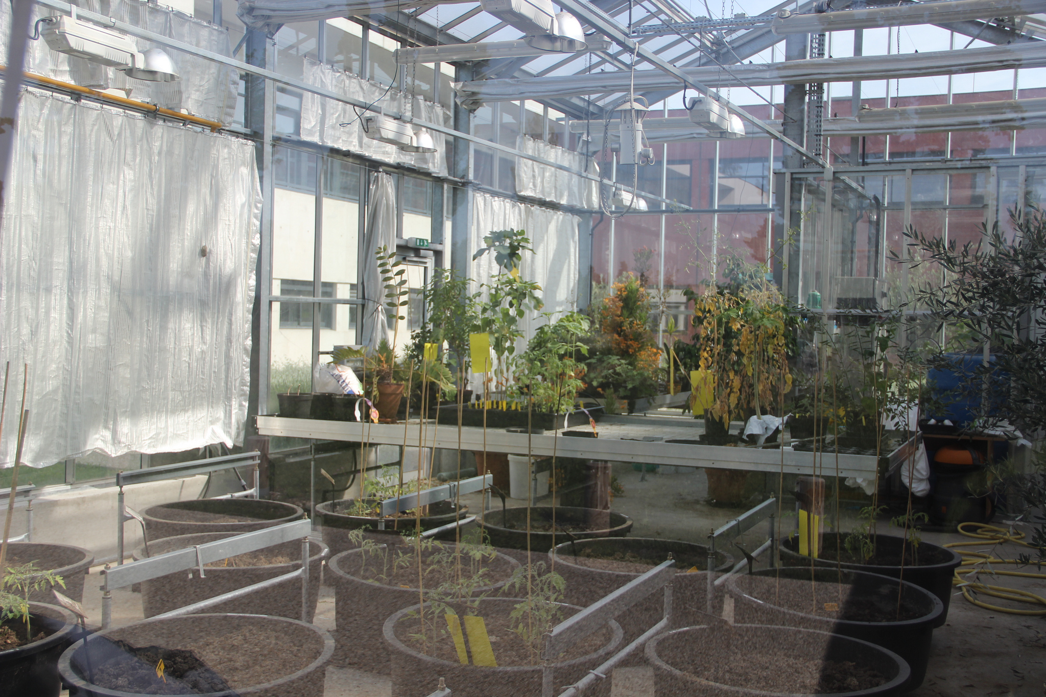 Serres Agroparc Avignon